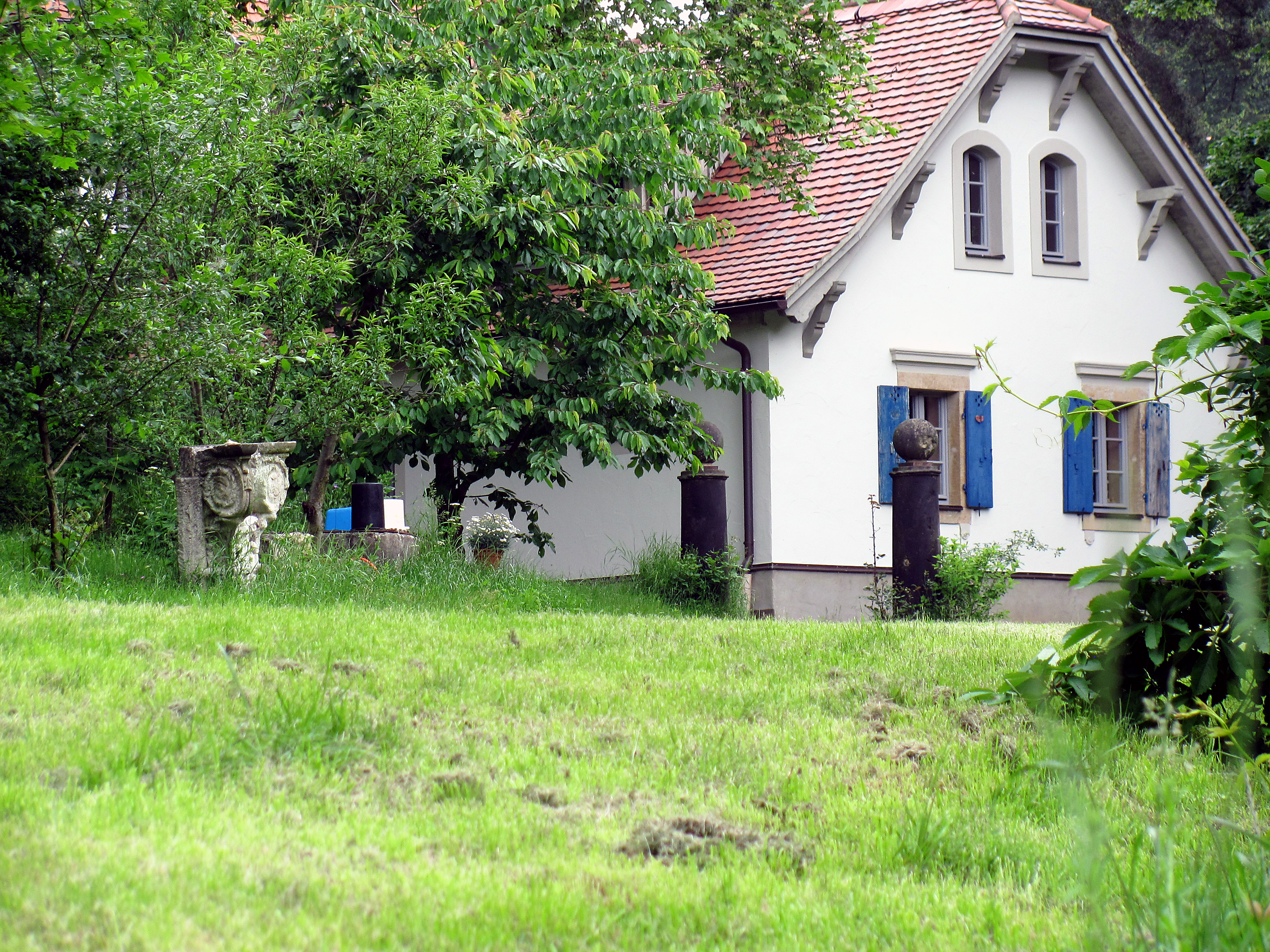 Radebeul-Zitzschewig, Donadini-Haus, Ursprungsgebäude mit Spolien